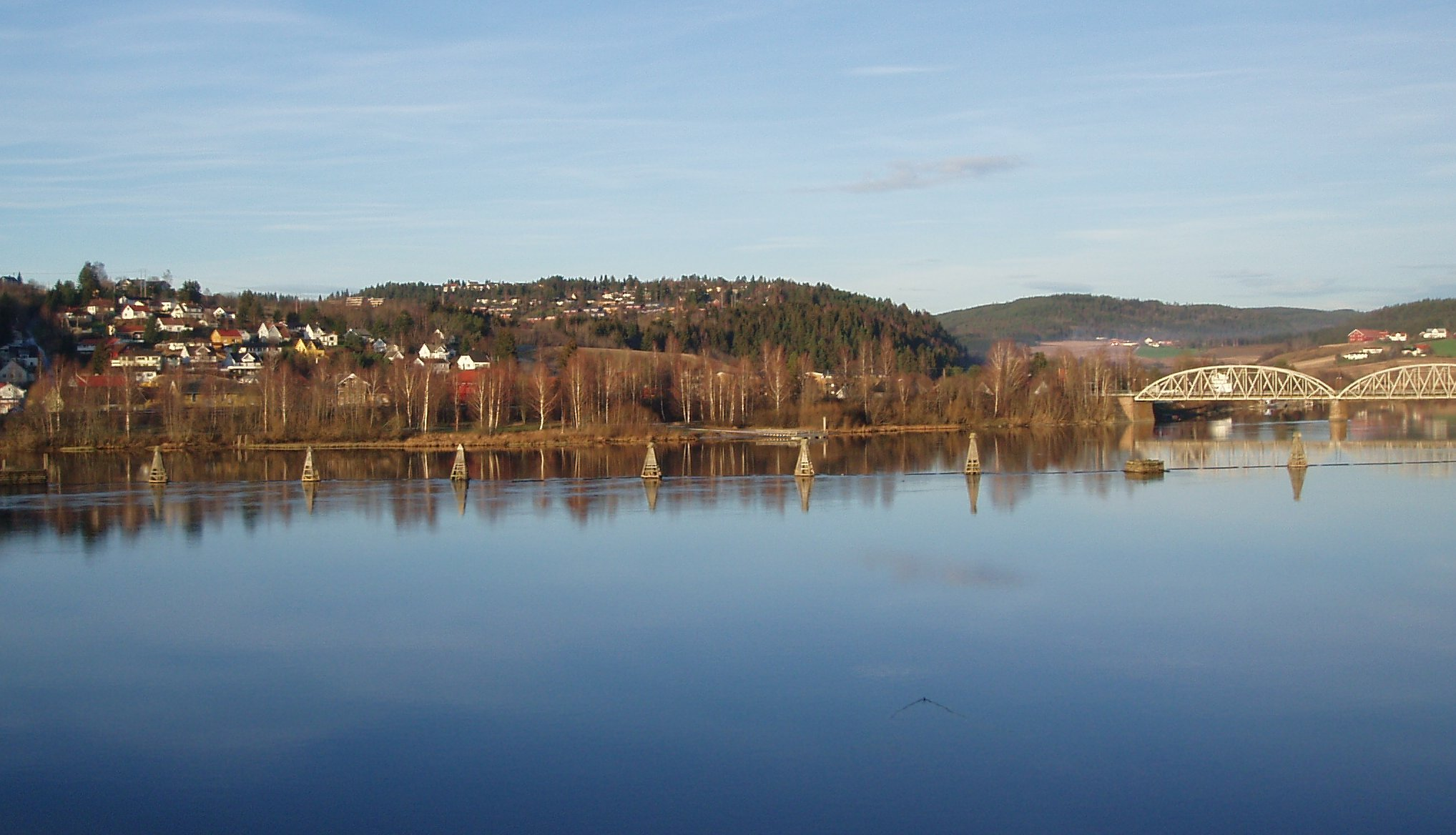 Fetsund er et tettsted og administrasjonssenter i Fet kommune i Akershus